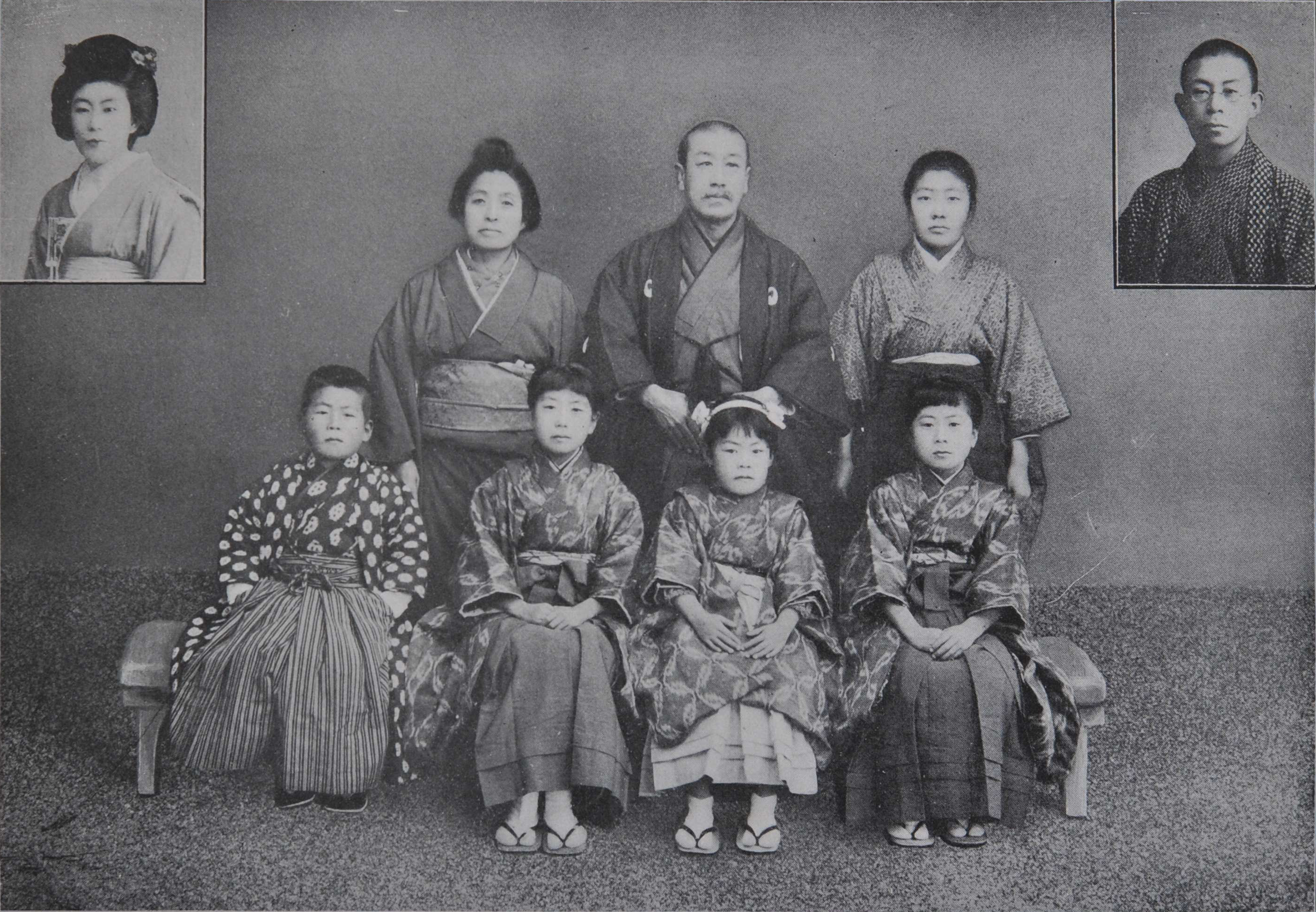 三吉米熊の家庭 右上：敬蔵（長男） 左上：富田治子（長女） 前列右から：登美子（五女）、勤子（六女）、幸子（四女）、豊城 後列右から：清子（次女）、米熊、春子（夫人）